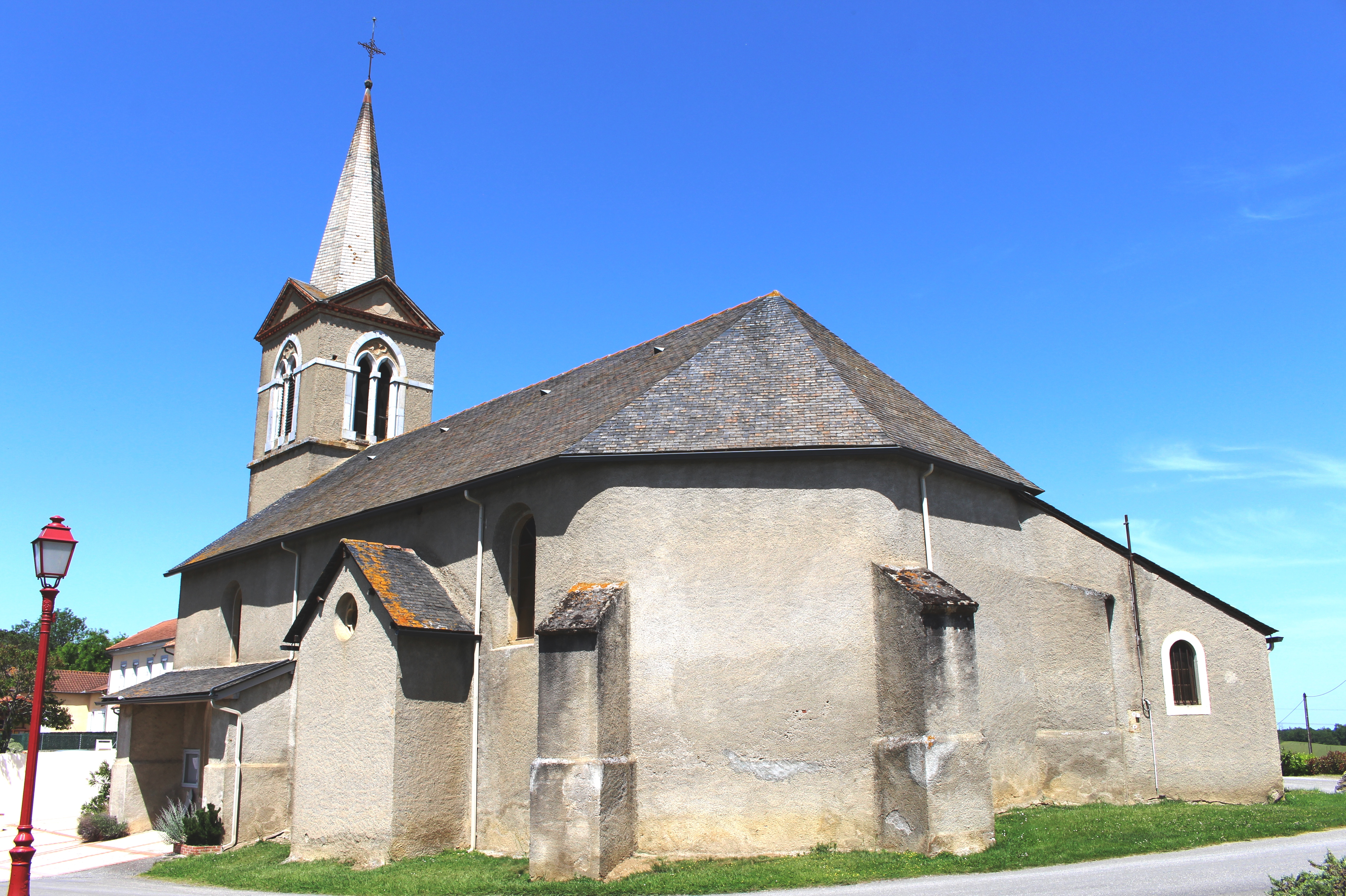 Église de l'Assomption de Sénac (Hautes-Pyrénées)